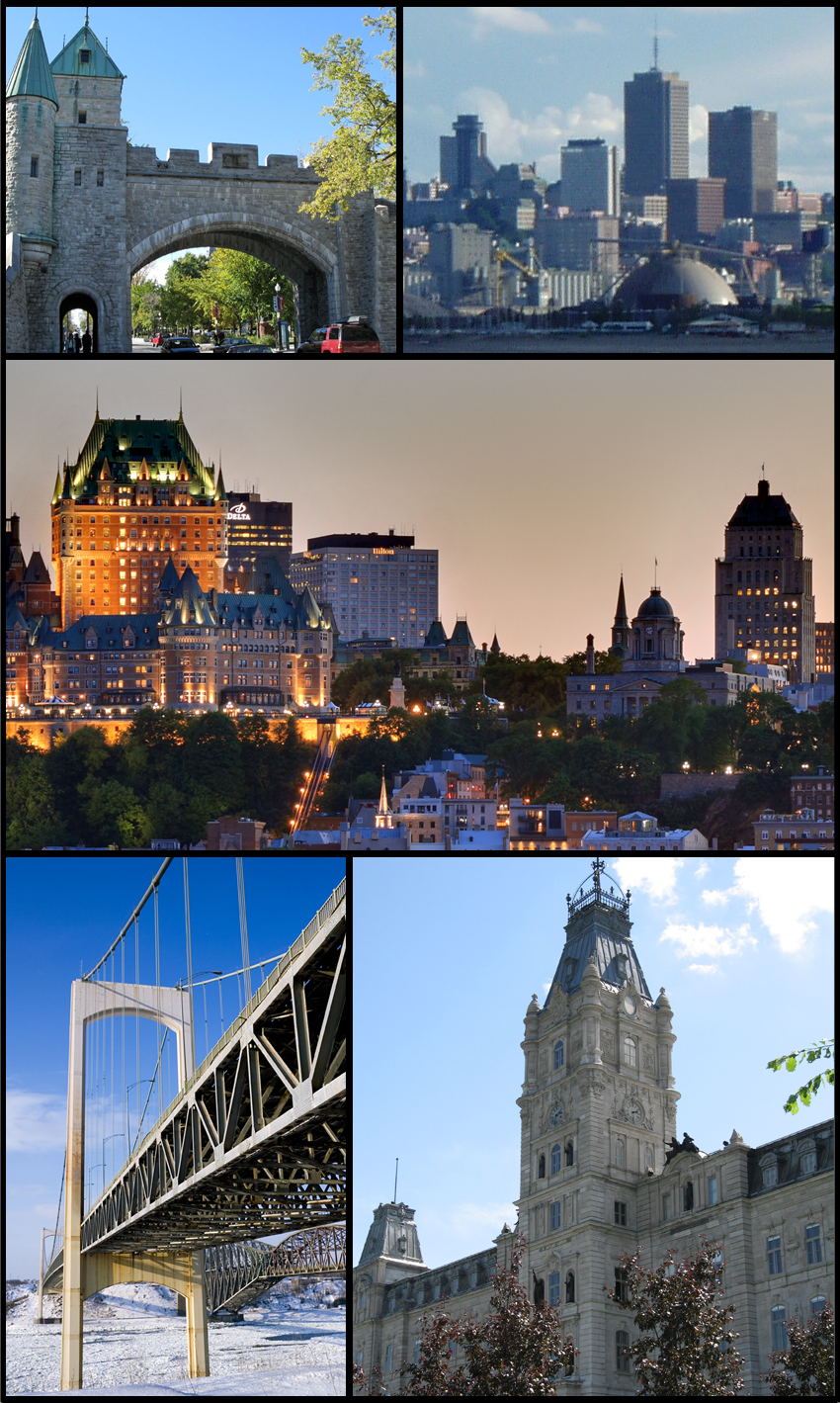 Montage de plusieurs endroits de la ville de Québec